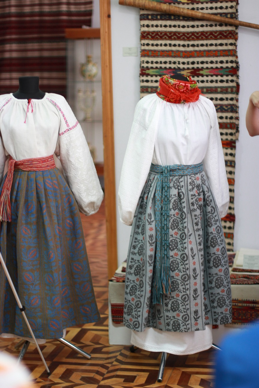 З лекціїї про одягові традиції Чернігівщини.